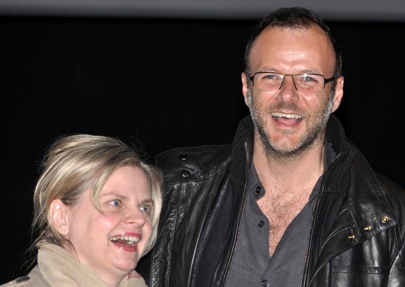 Pierre-François Martin-Laval et Isabelle Nanty à l'avant-première du film "Les Profs"